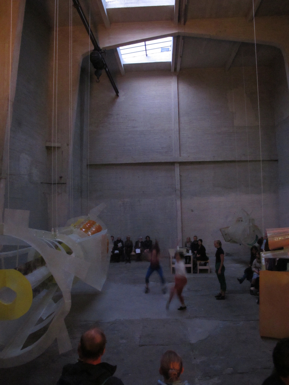 Interiørbilde - trelasthall